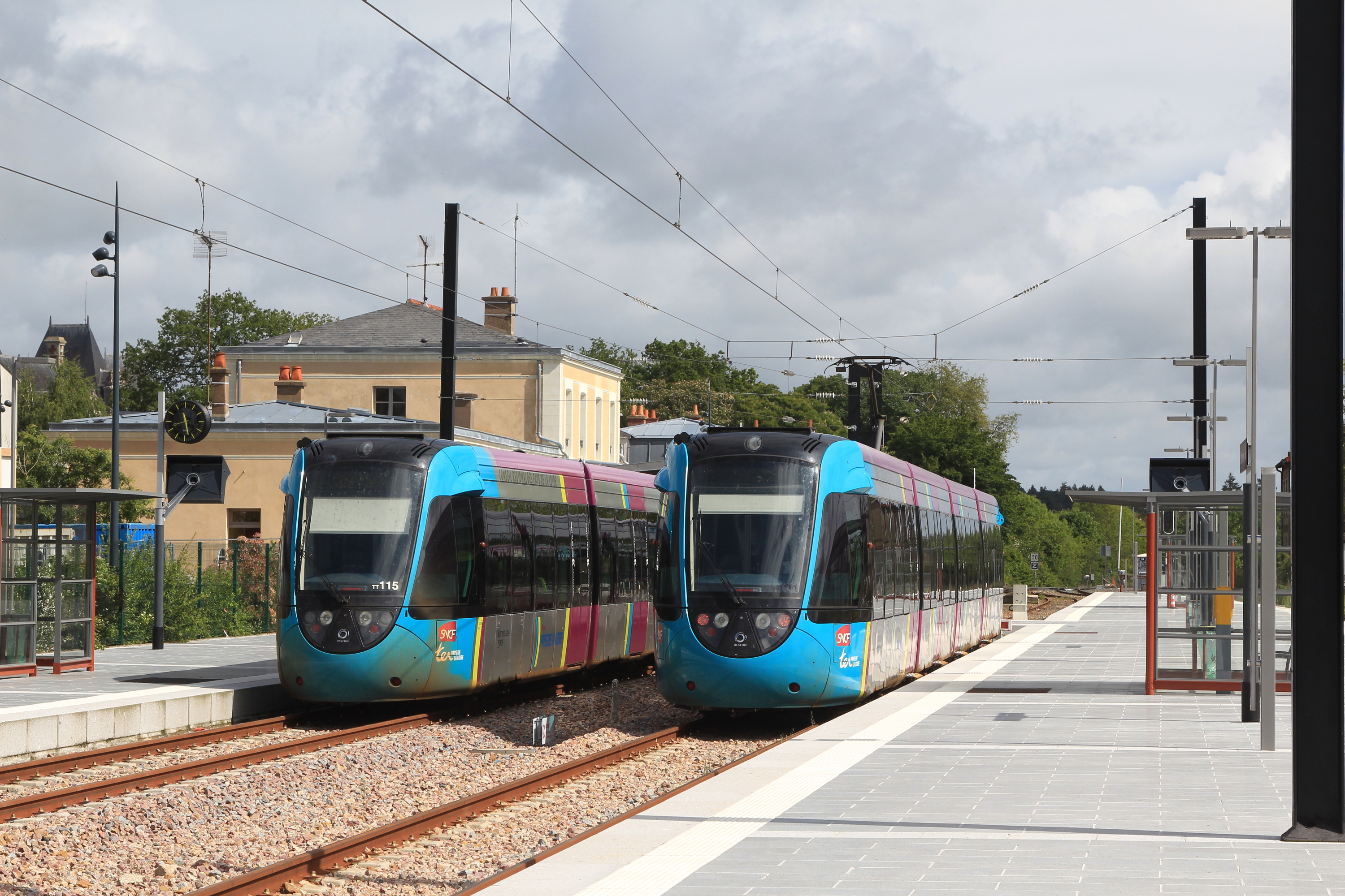 Deux trams-trains U 53500 stationnent à la gare de Châteaubriant, à la mi-journée en semaine.